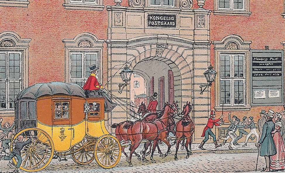 Rasmus Christiansen: Den agende post ankommer til Københavns Postgaard (postkort)